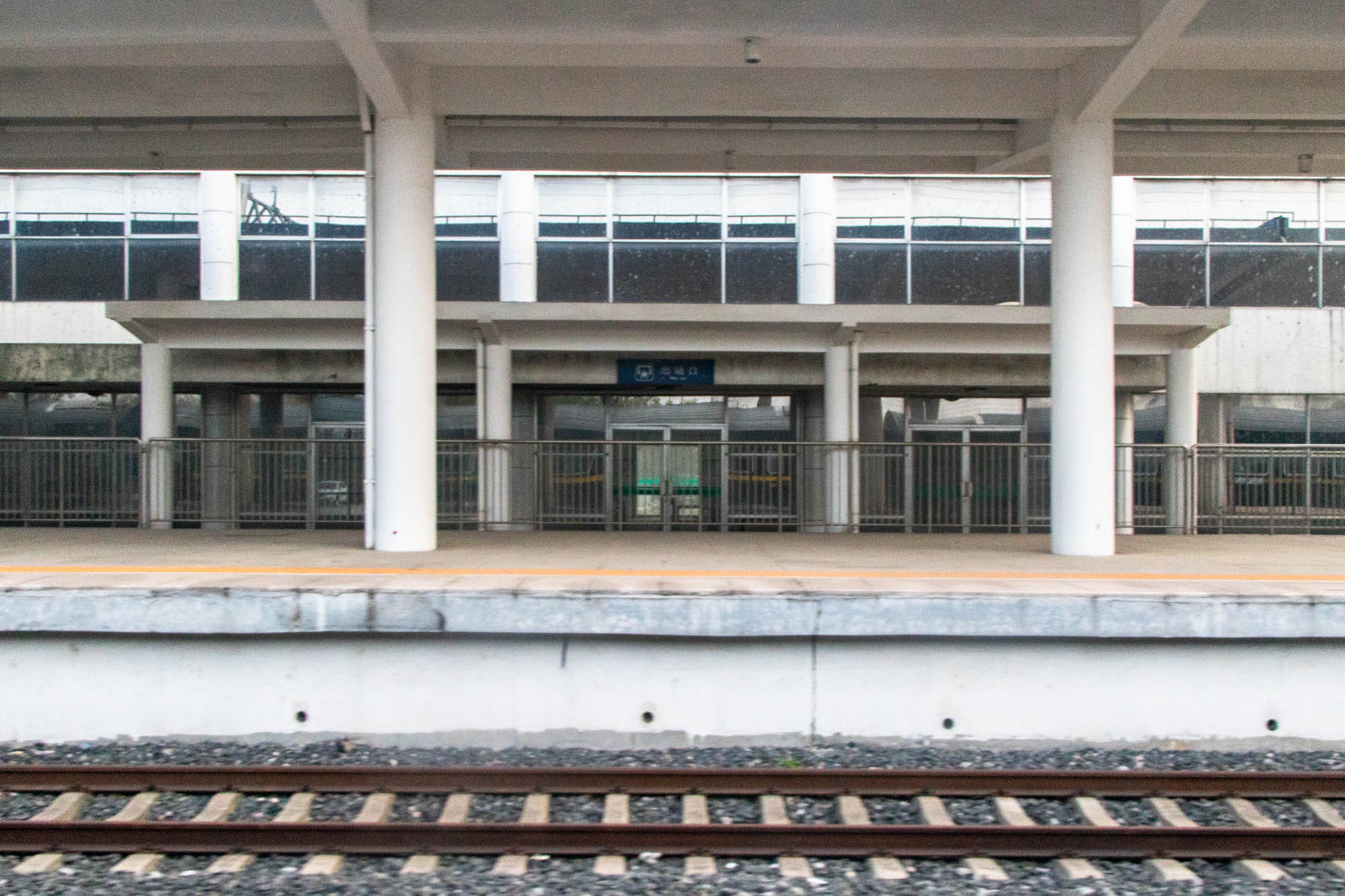 中文（中国大陆）: 中国铁路宁启线仪征站站房